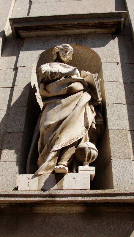 Escultura de 1795 en la fachada del Palacio del Cardenal Lorenzana, antigua Real Universidad de Toledo (España)